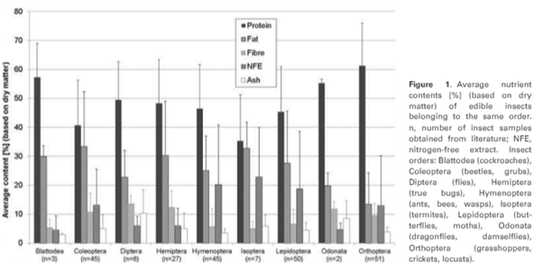 Conteúdo nutricional de algumas espécies de insetos, em porcentagem (%), baseados na matéria seca.